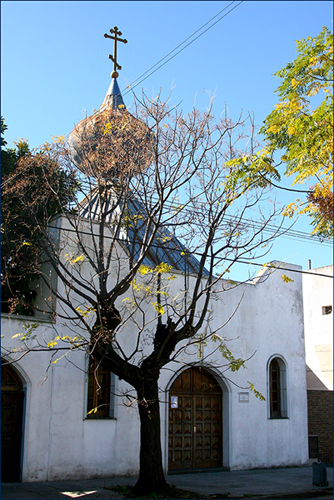 Храм прп.Иова игумена Почаевского